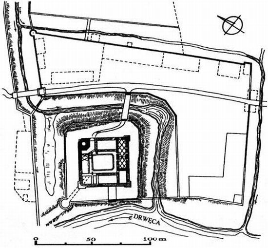 Plan zamku w Brodnicy wg Konrada Steinbrechta